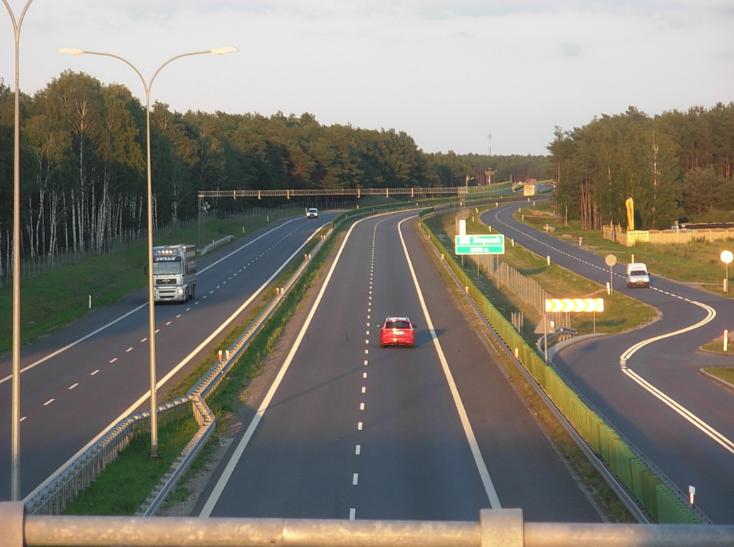 Droga ekspresowa S5-S10 Stryszek-Białe Błota, stanowiąca fragment południowej obwodnicy Bydgoszczy